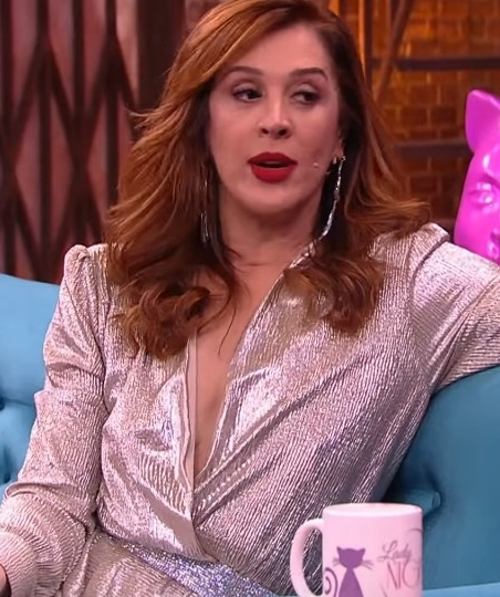 A atriz Cláudia Raia no Lady Night em 2018.